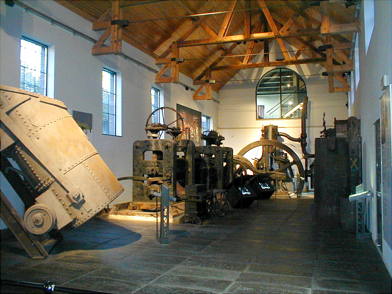 Vue d'ensemble du musée de l'industrie situé dans les bâtiments de la mine du Bois du Cazier